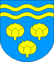 Sõmerpalu valla vapp.